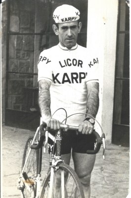 Alfredo Irusta en el equipo KARPY.